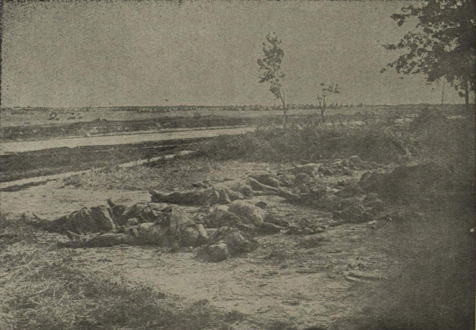 Беларуская (тарашкевіца): Менск (Miensk), тракт Койданаўскі (trakt Kojdanaŭski). Масавае пахаваньне мірных жыхароў Менску, забітых бальшавікамі